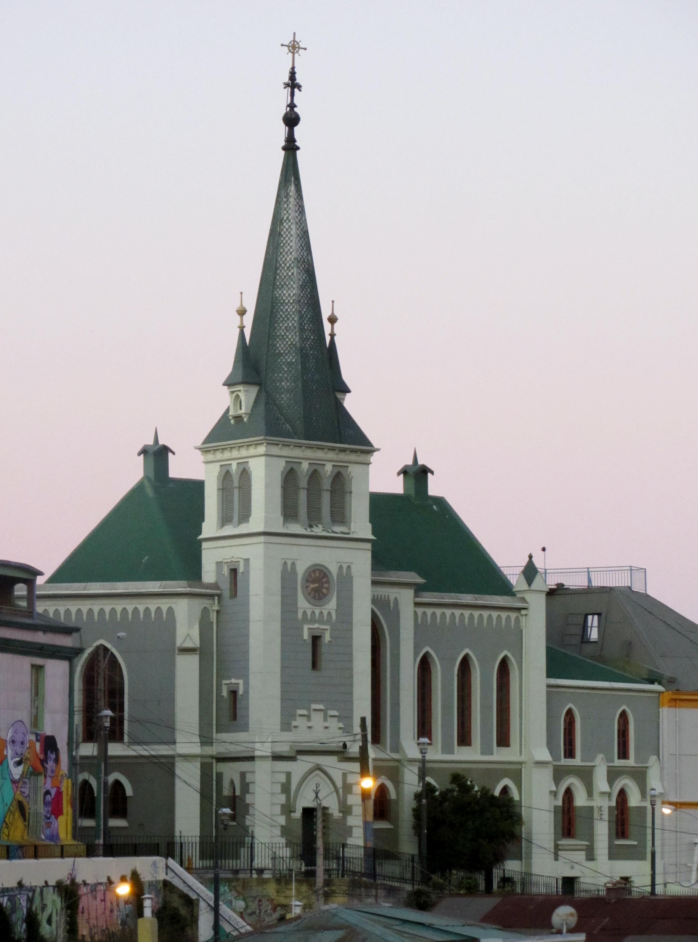 La Iglesia luterana de Valparaíso fotografiada al atardecer desde la salida de la estación alta del ascensor Reina Victoria, paseo Dimalow, sobre la plazoleta Lukas.